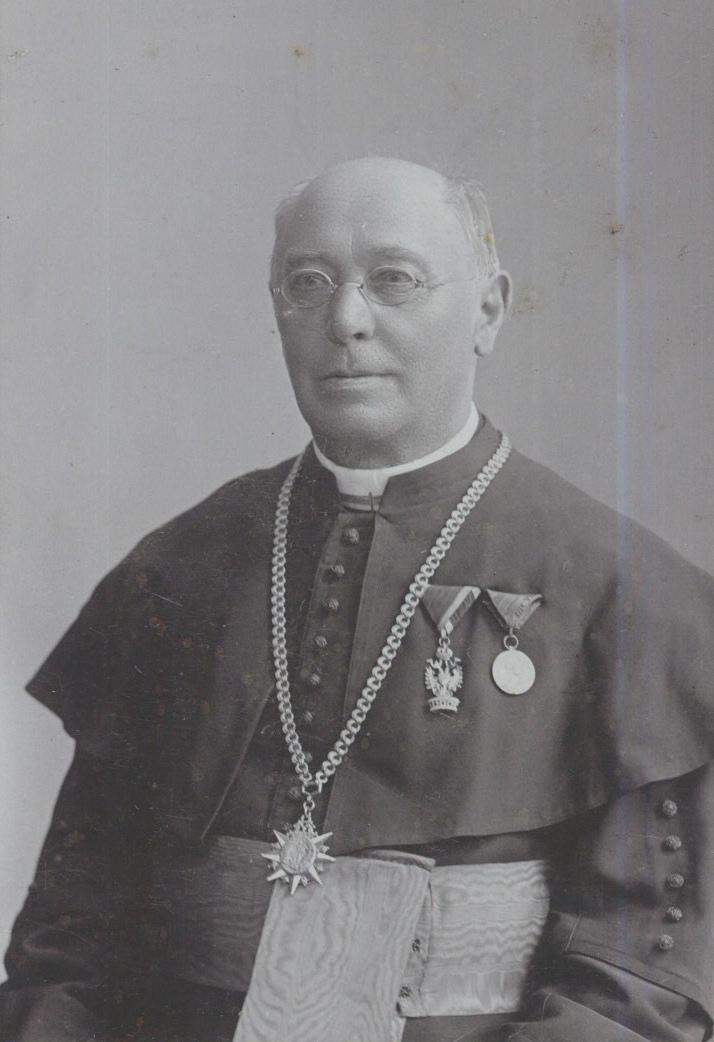 Kanovník Josef Bergman v roce 1901